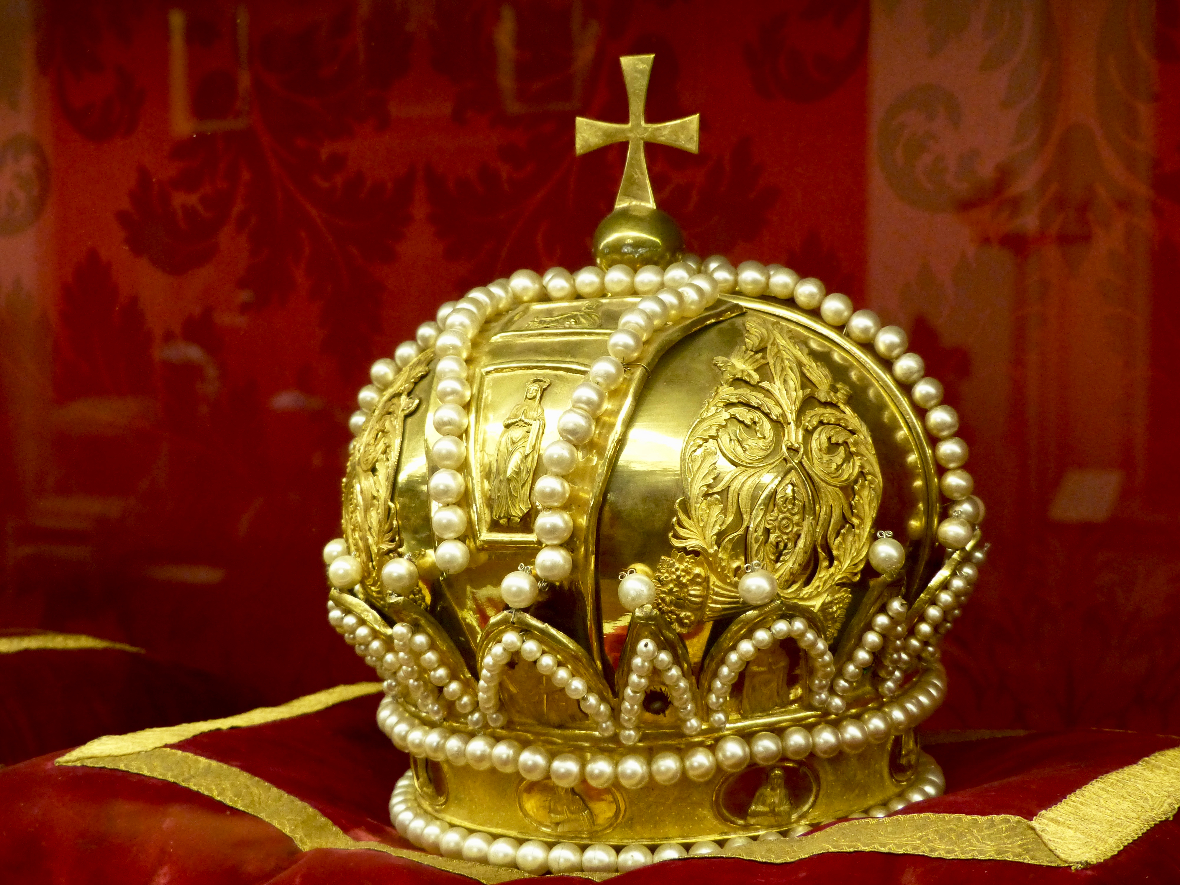 Hofmobiliendepot Wien: Wenzelskrone (Funeralkrone)